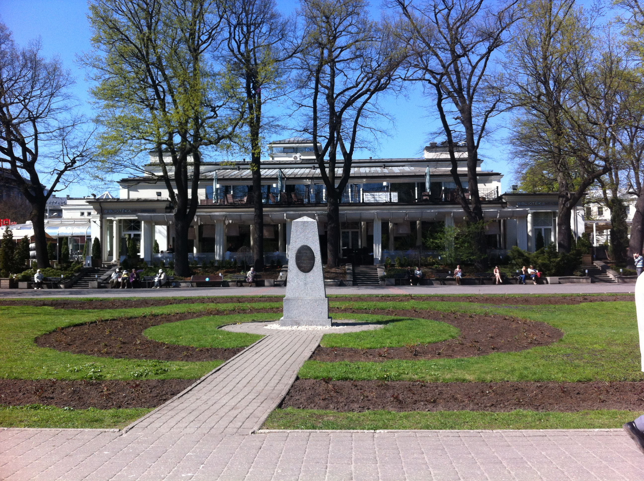 Centrs, Centra rajons, Rīga, Latvia